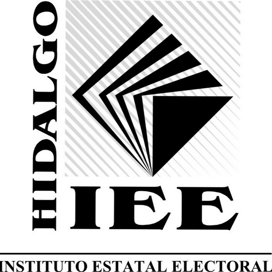 Logo del Instituto Estatal Electoral de Hidalgo de México (América del Norte)